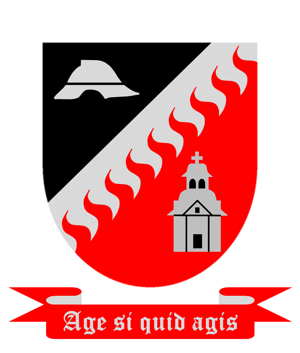 Virolahden vpk vaakuna